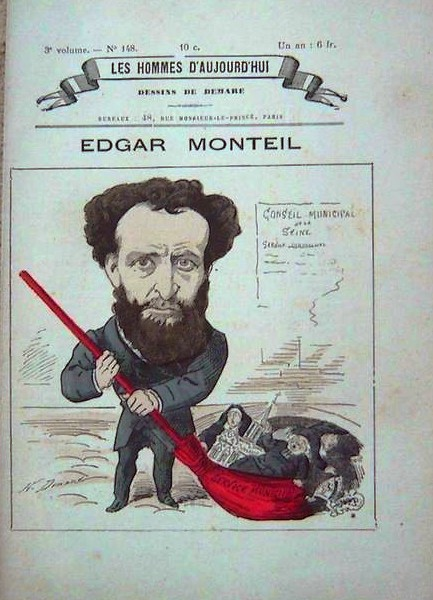 Les Hommes d'aujourd'hui, n°148 (Vers 1881). Caricature d'Edgar Monteil par Henri Demare.